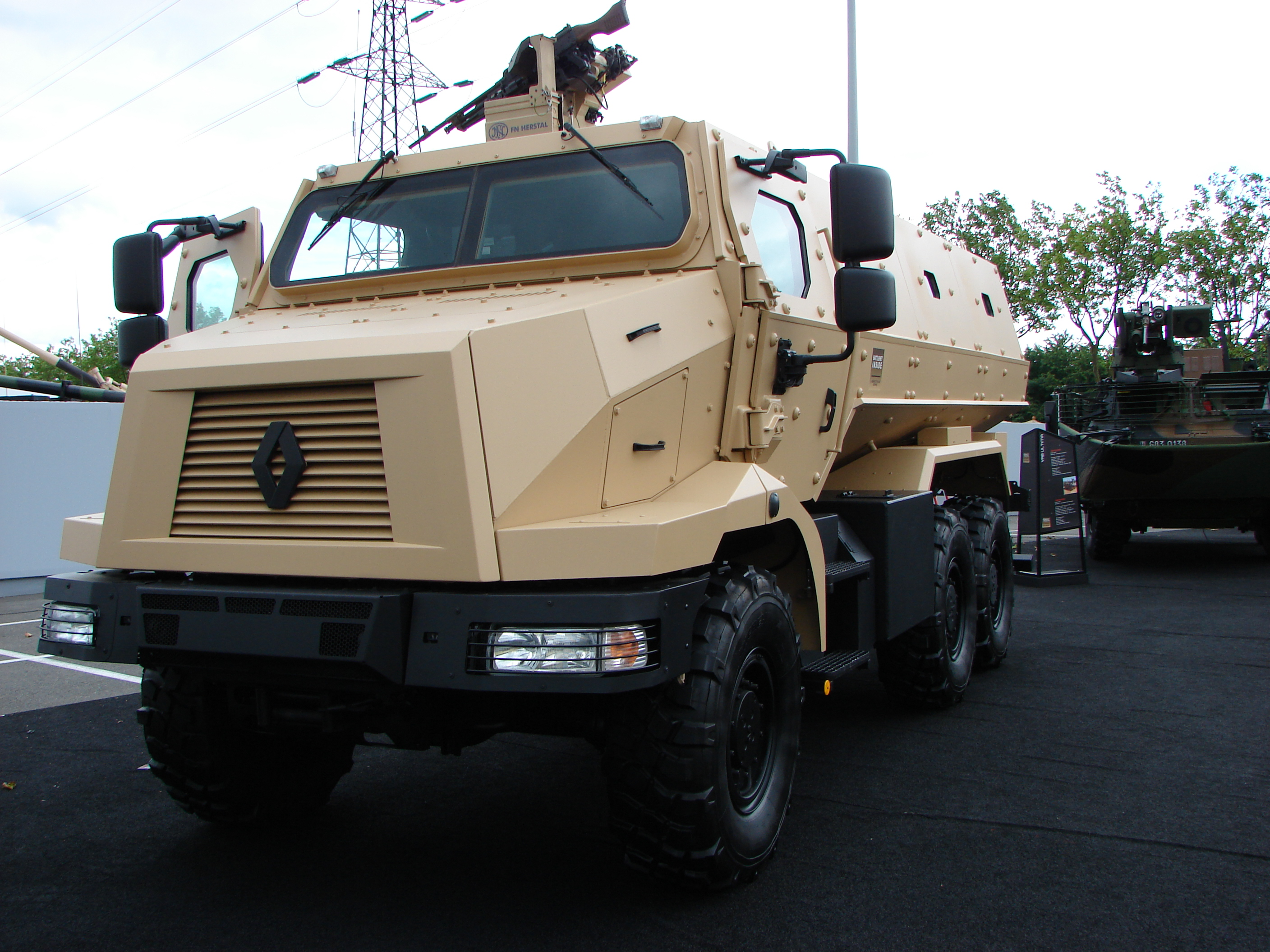 Renault Trucks Defense à Eurosatory 2012